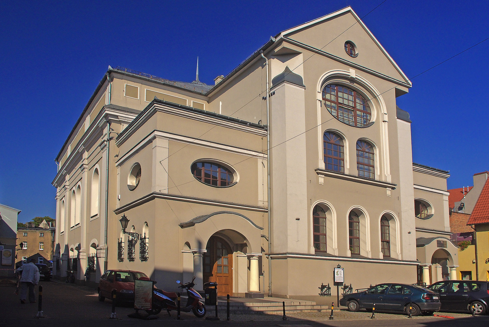 Leszno, ul. Narutowicza 31 - synagoga (obecnie muzeum) z końca XVIII w., 1904 r. (zabytek nr 1197/A)